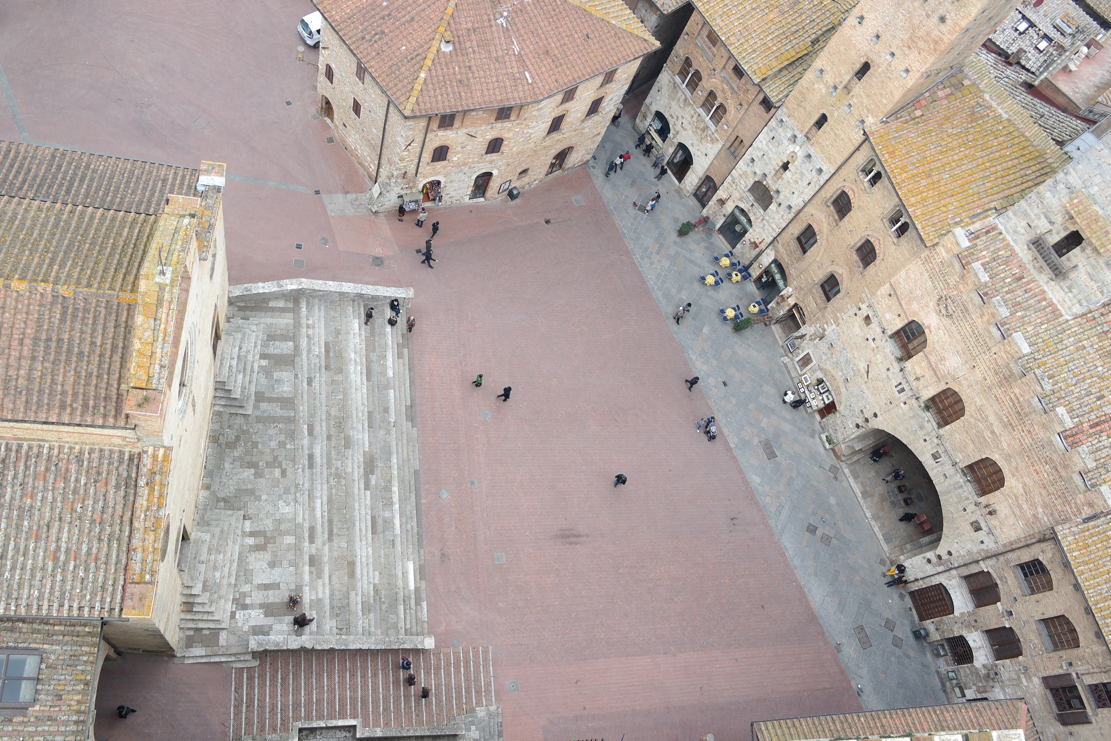 Piazza del Duomo a San Gimignano dalla Torre Grossa